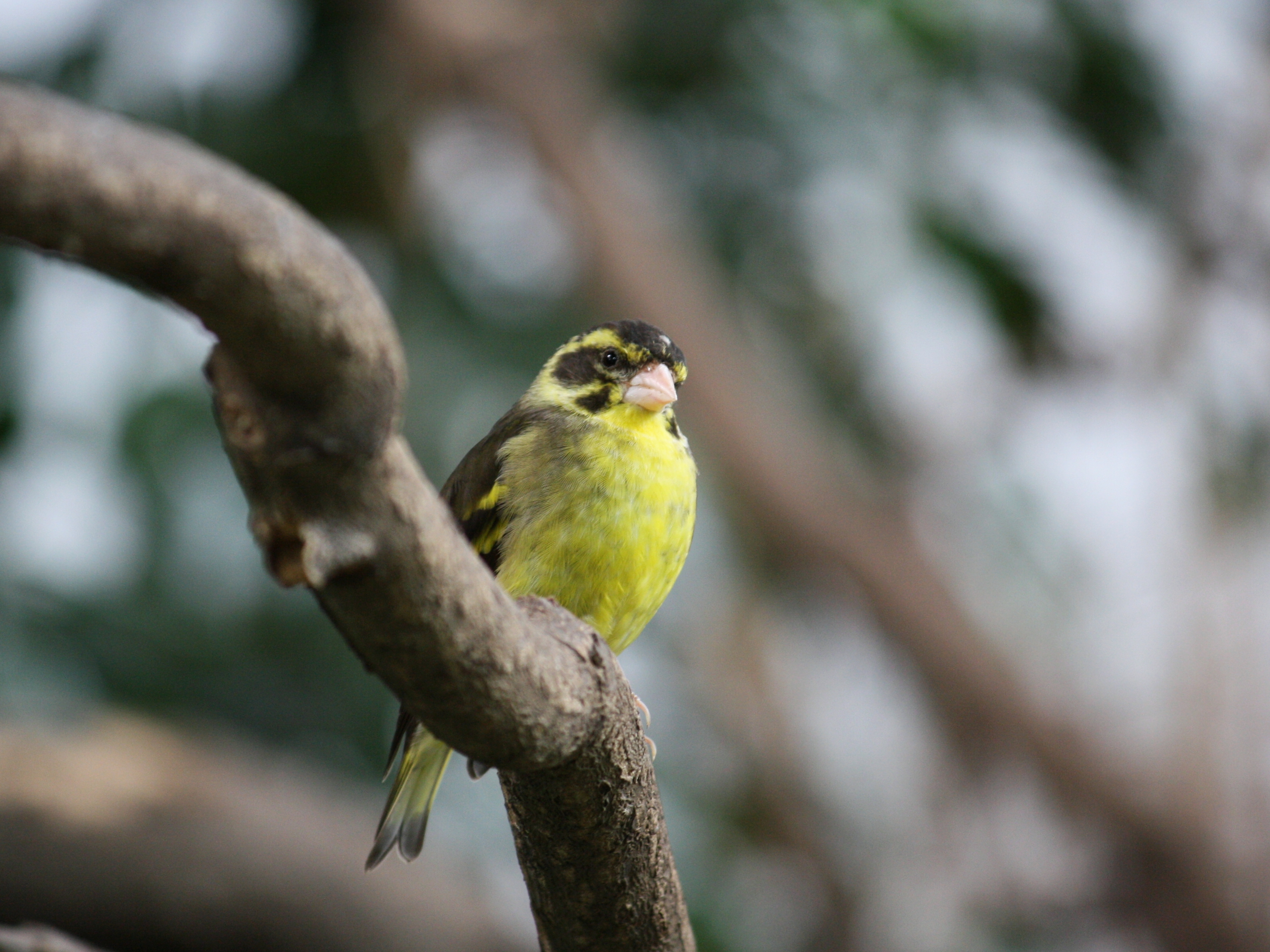 Zvonek žlutoprsý v pražské Zoo